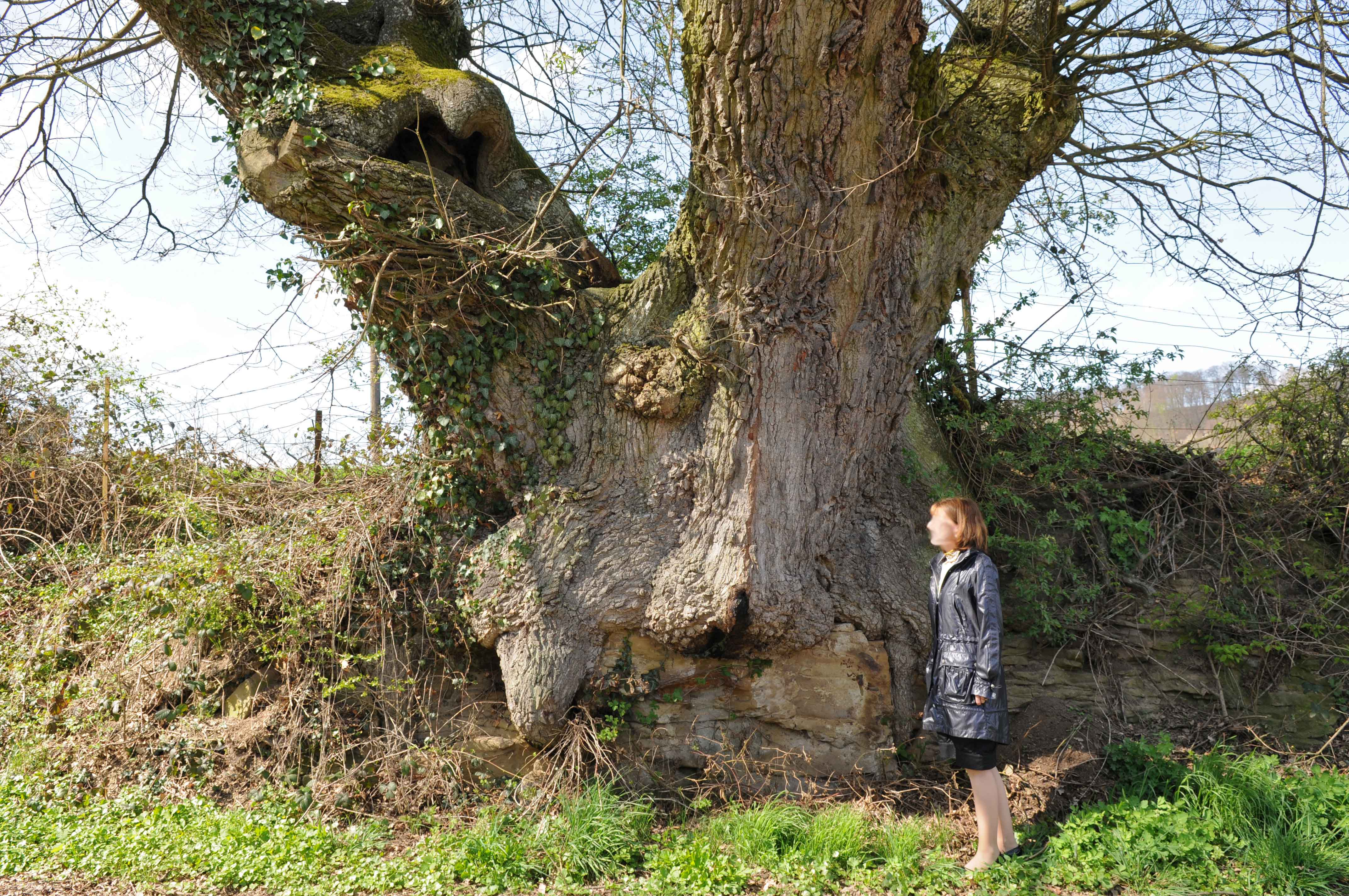 Eech um Kinséckerhaff.